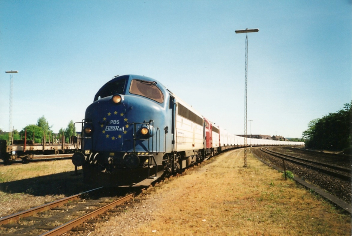 MY 1110 og MY 1122 ved Privatbanen Sønderjylland/Eurorail med containere fra Mærsks containerfabrik i Tinglev med destination Århus Havn.